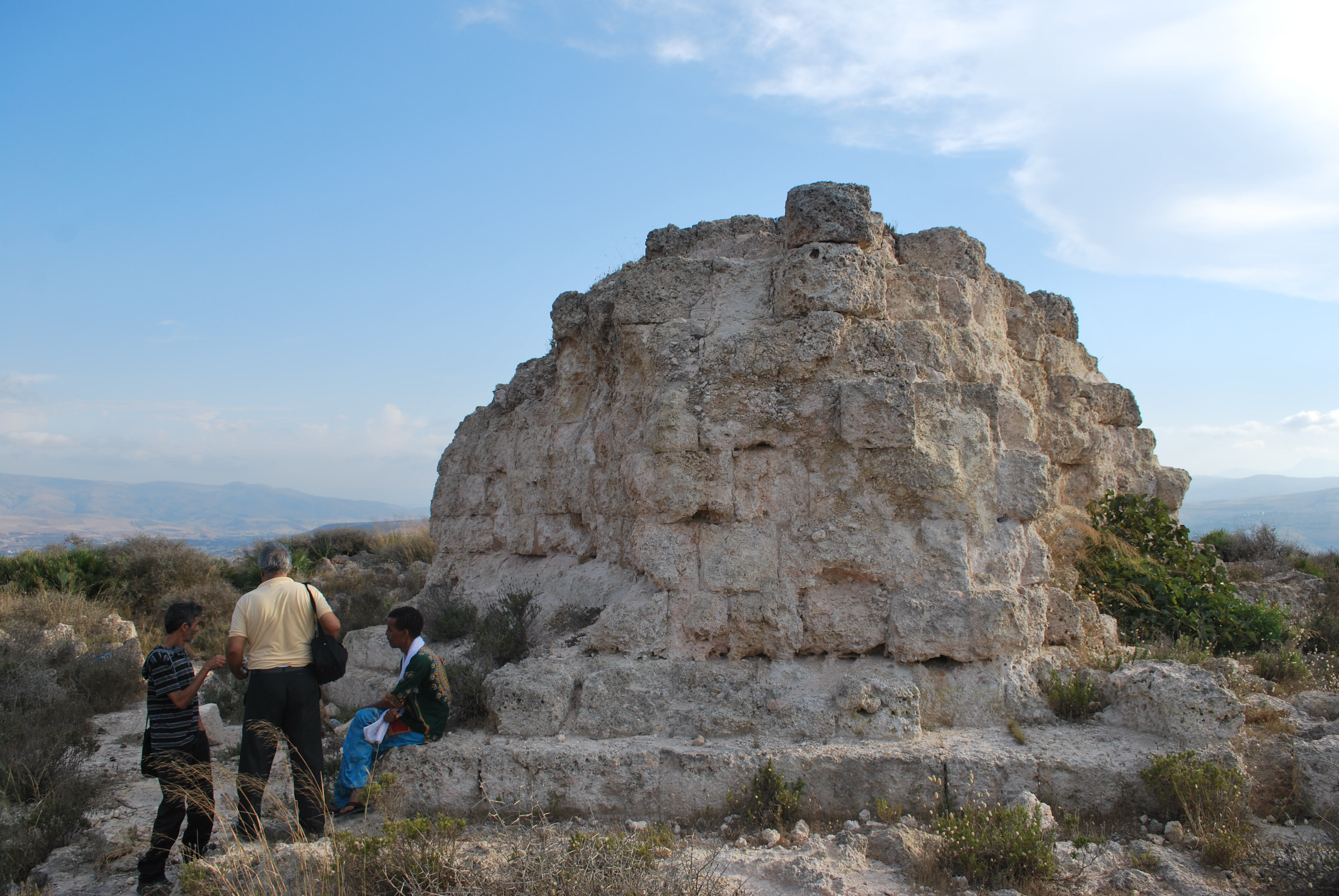 Tombeau de syphax